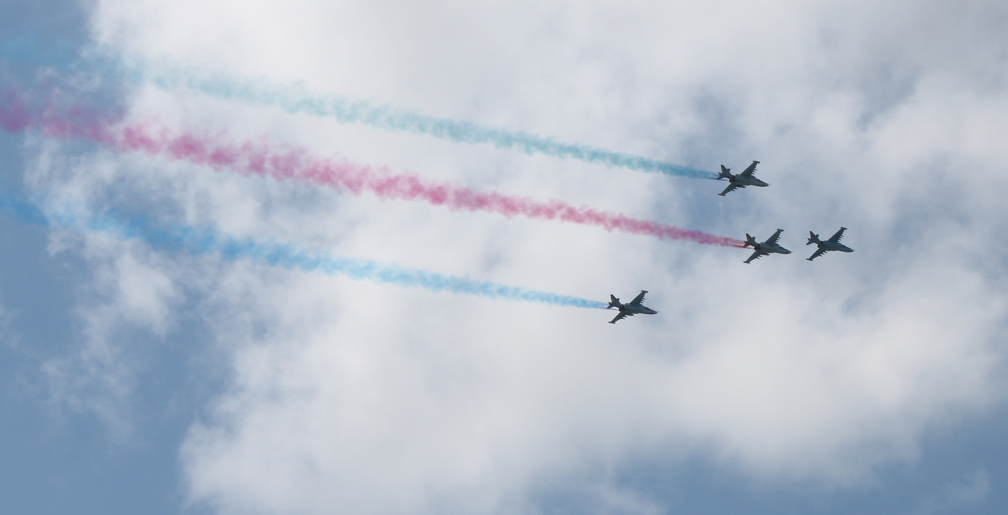 Военный парад в Баку в день вооруженных сил Азербайджана.